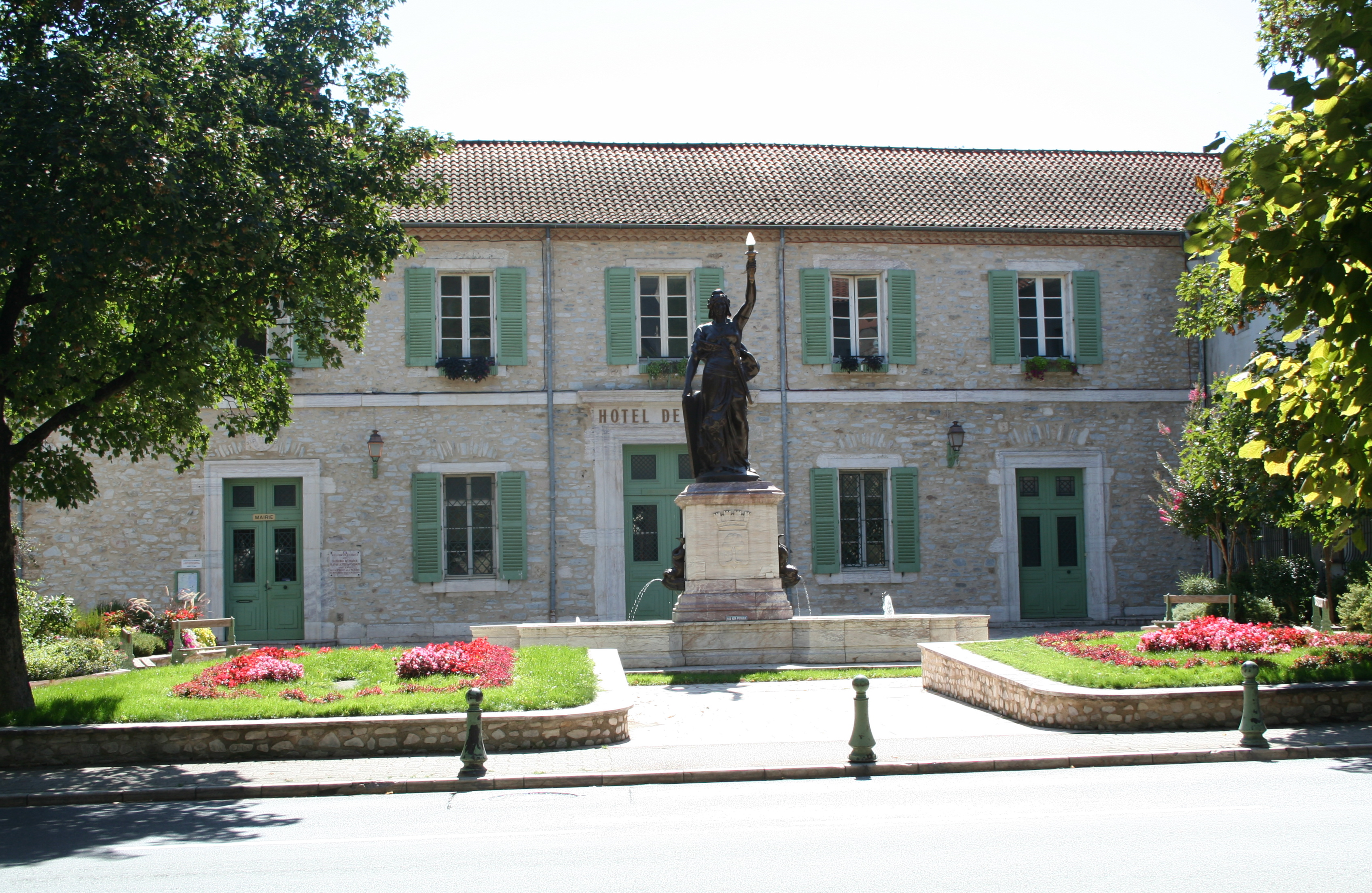 Saint-Pons-de-Thomières (Hérault) - Mairie et statue de Marianne.